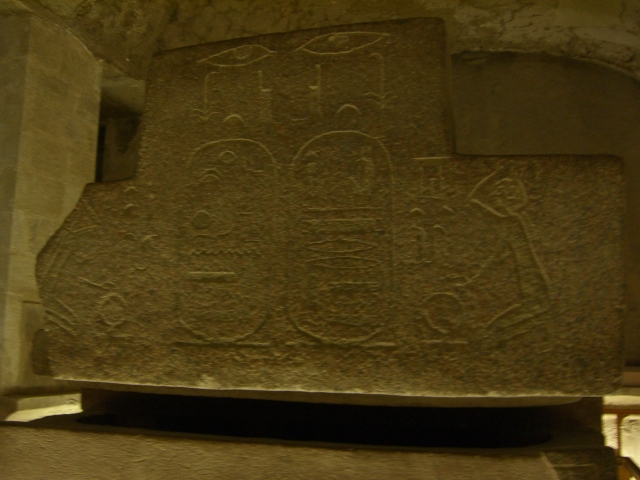 Cartouches du Pharaon Sethnakht dans sa tombe de la Vallée des Rois - XXe dynastie